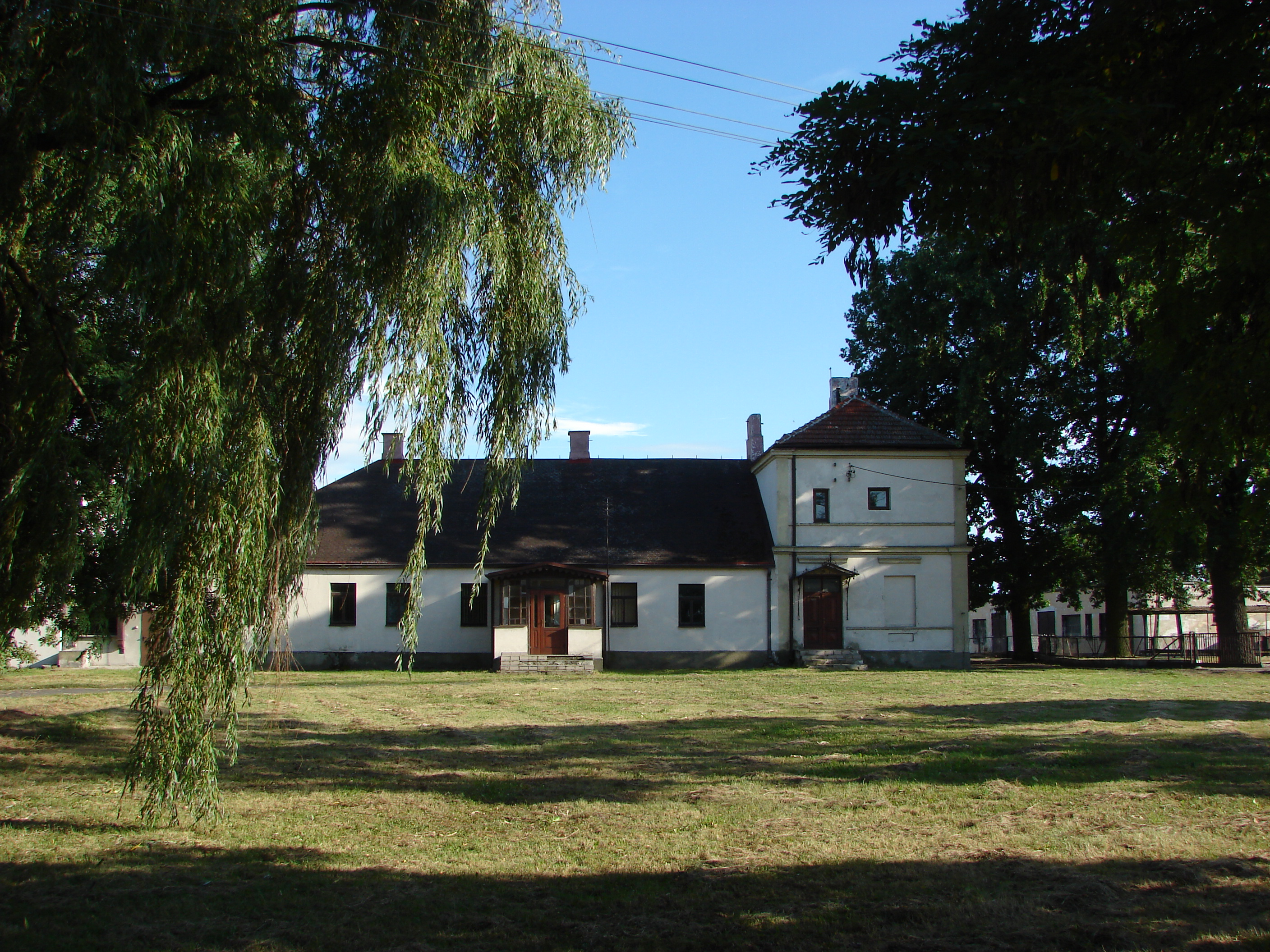 Świętosław, zespół dworski